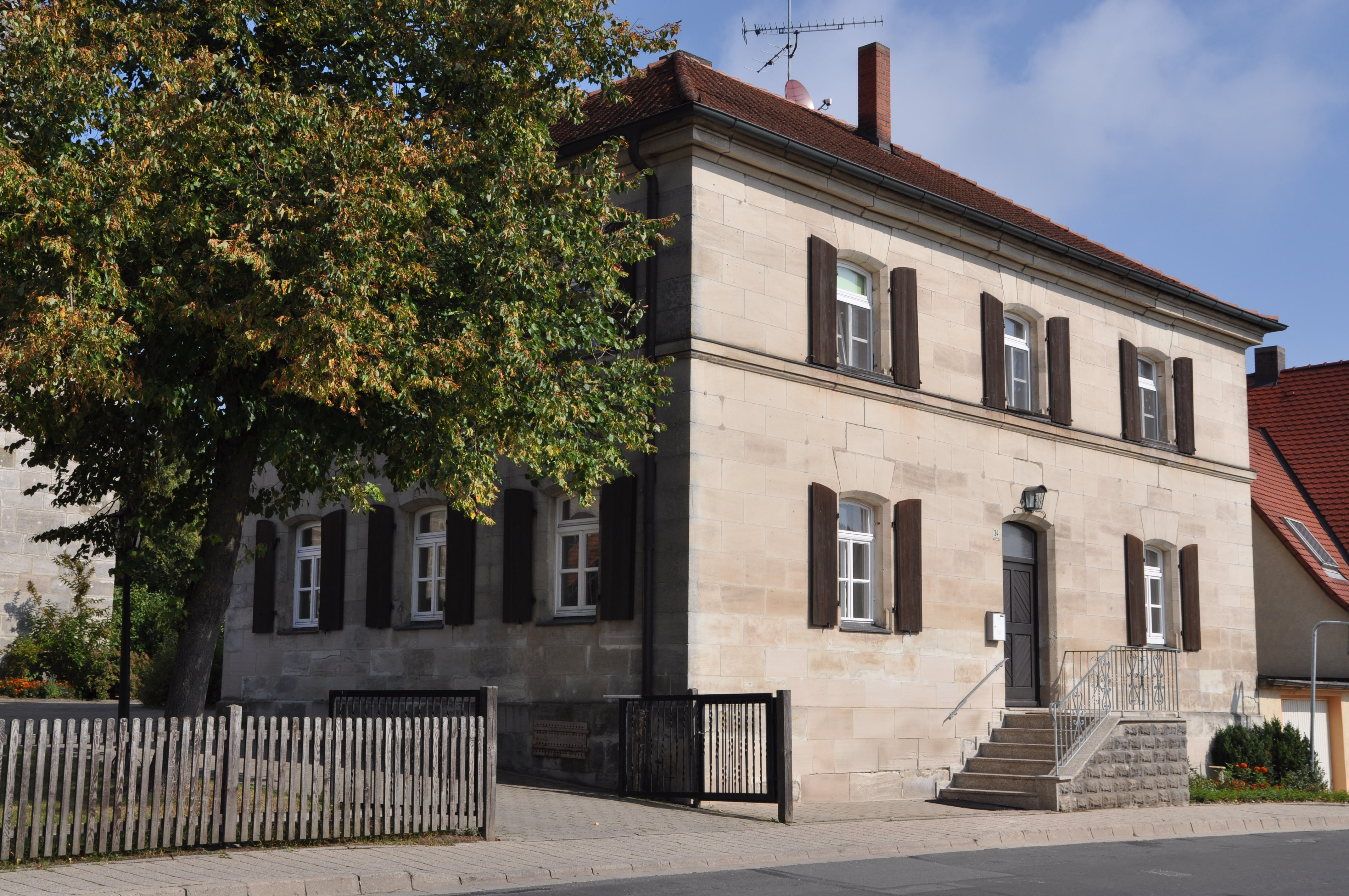 Ehem. Schulhaus, Walmdachbau, Sandsteinquader, spätklassizistisch, um 1860.This is a photograph of an architectural monument.